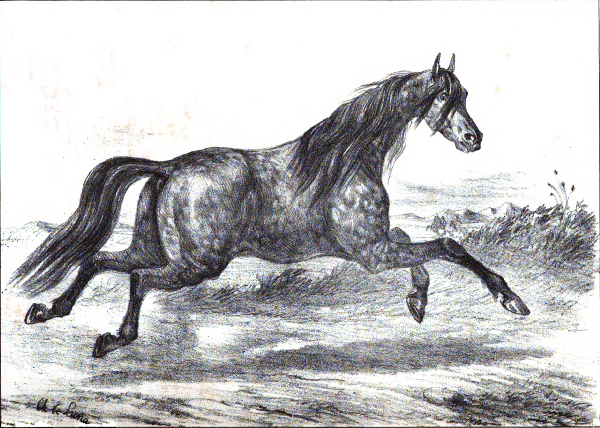 Turkmene, Turkoman horse